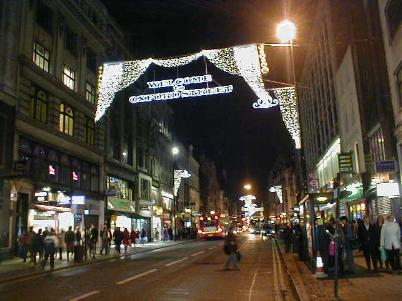 Luces navideñas en Oxford Street (Londres)